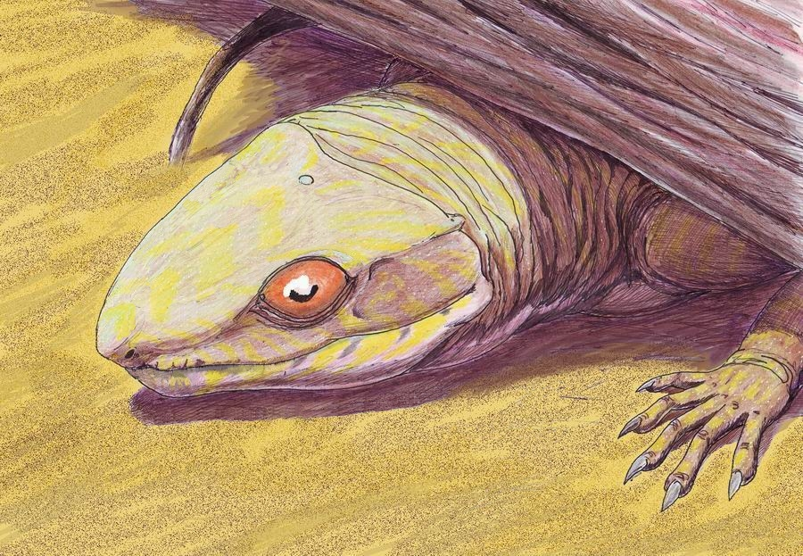 Эдалеопс